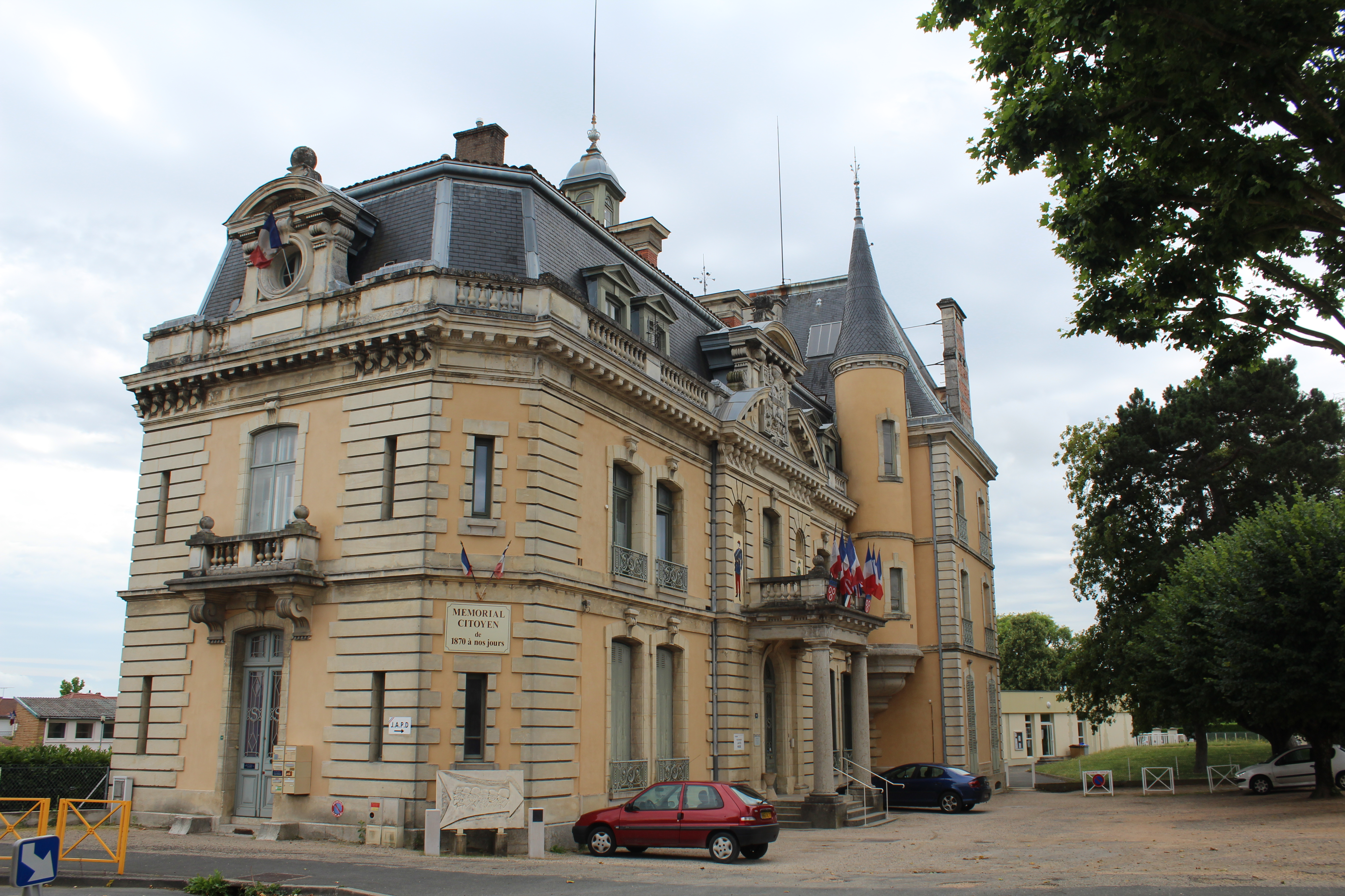 Musée du souvenir français dans le château du Grand Four, à Flacé, quartier de Mâcon.